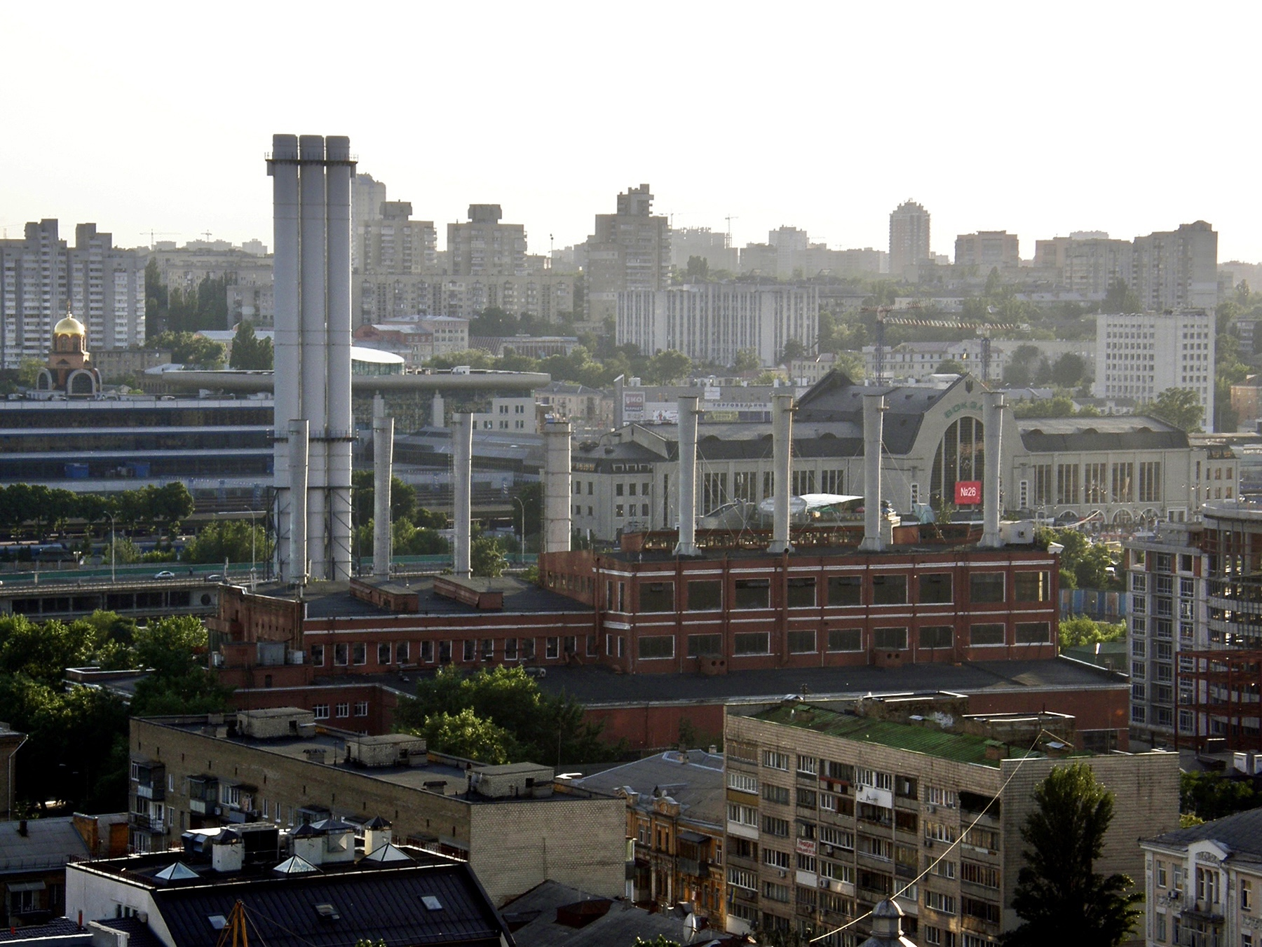 станція теплопостачання СТ-1